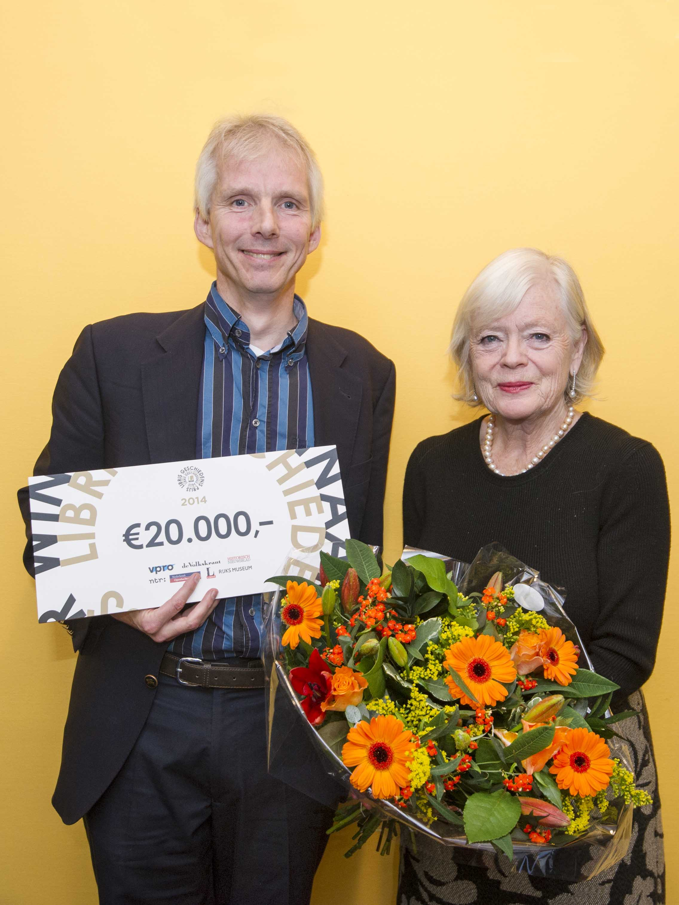 Winnaar Libris Geschiedenis Prijs 2014 Dik van der Meulen (links) wint de Libris Geschiedenis Prijs 2014. De prijs werd uitgereikt door Heleen Dupuis (rechts) juryvoorzitter van de Libris Geschiedenis Prijs 2014. op zondag 26 oktober tijdens het radioprogramma OVT op radio 1.